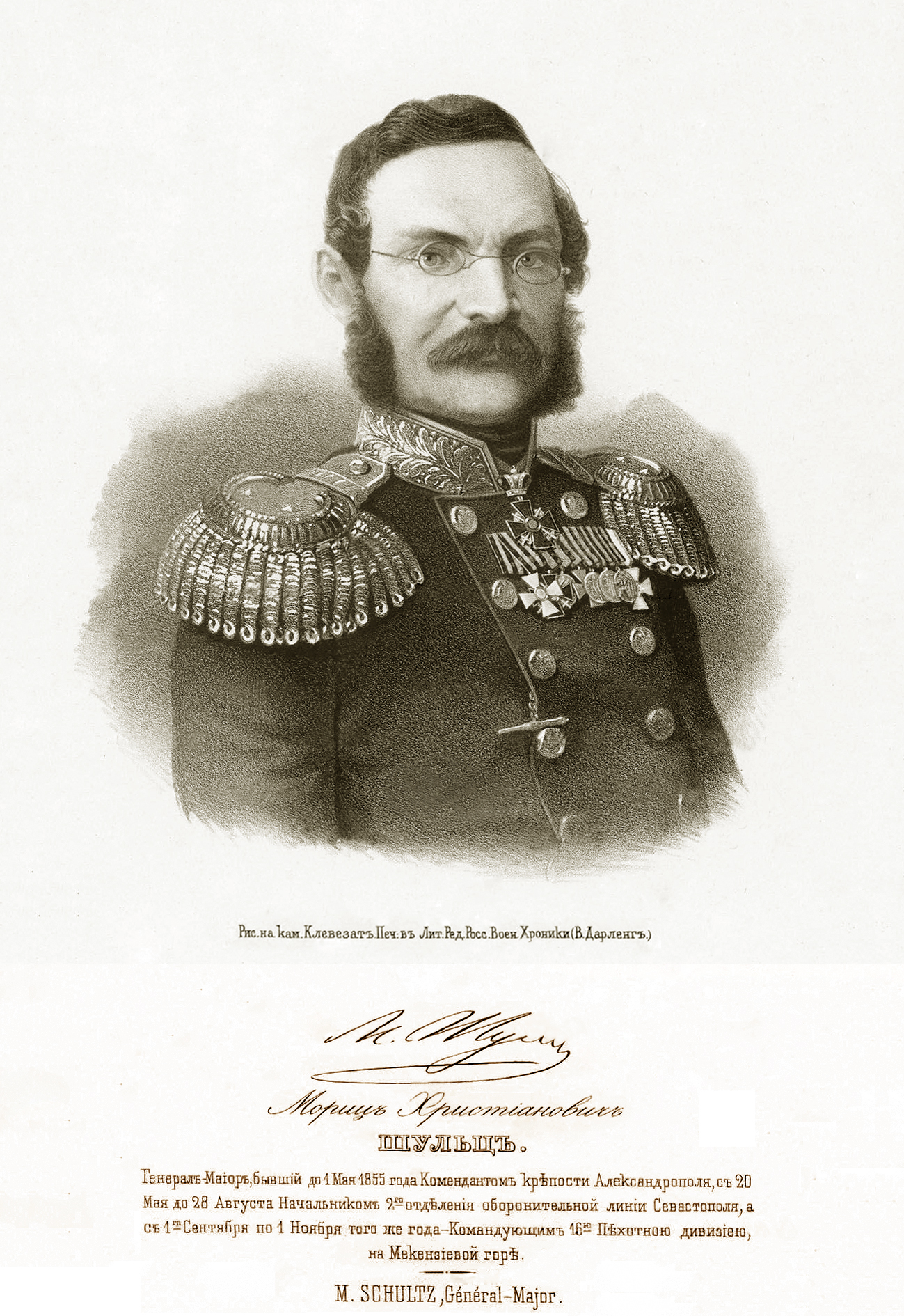 генерал-майор Мориц Христианович Шульц